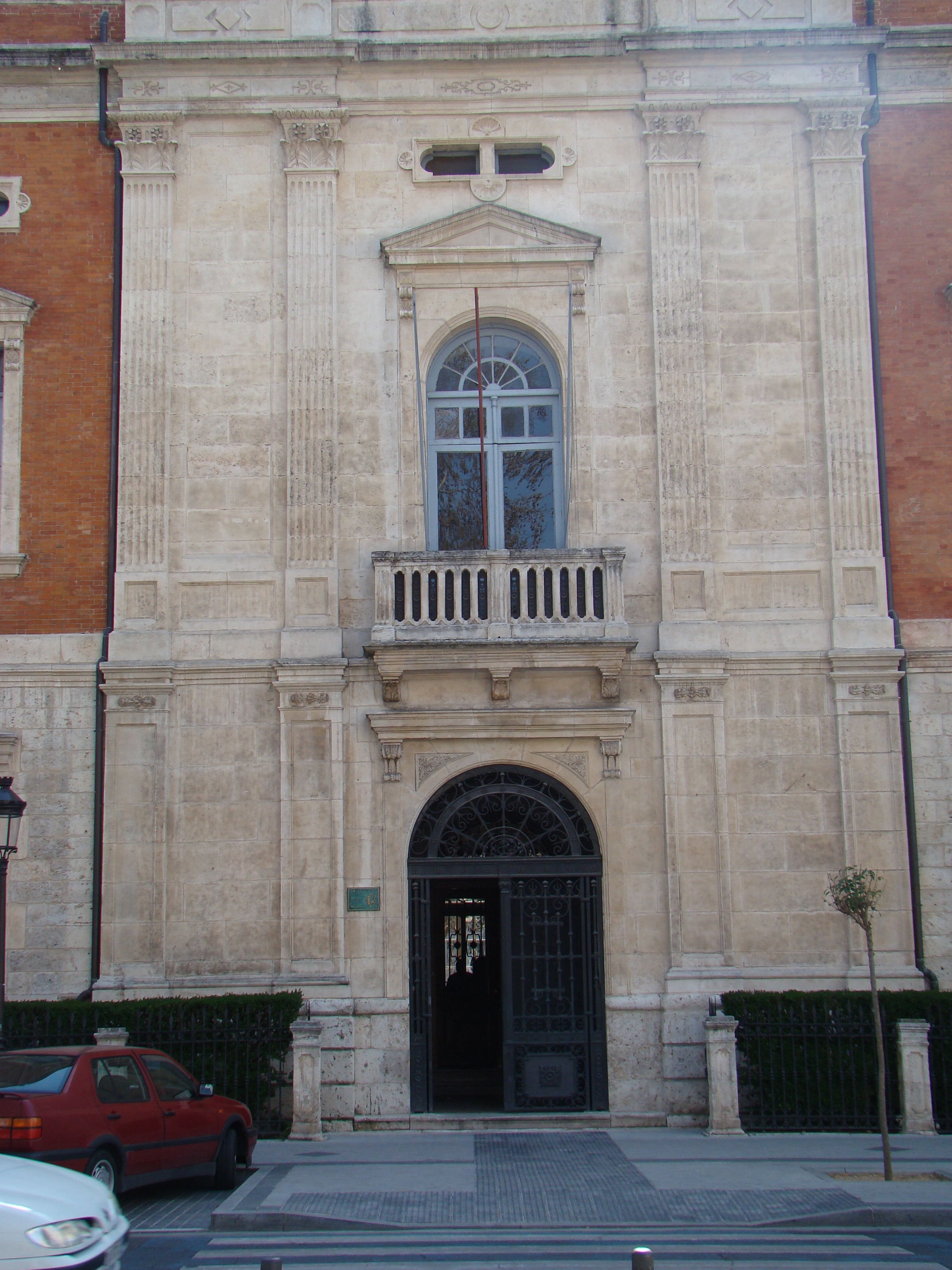 Valladolid (España). Entrada del Colegio de San José, jesuita. Uno de los ejemplos de arquitectura ecléctica más destacados de la época (1882-1884). Autor: Jerónimo y Antonio Ortiz de Urbina.